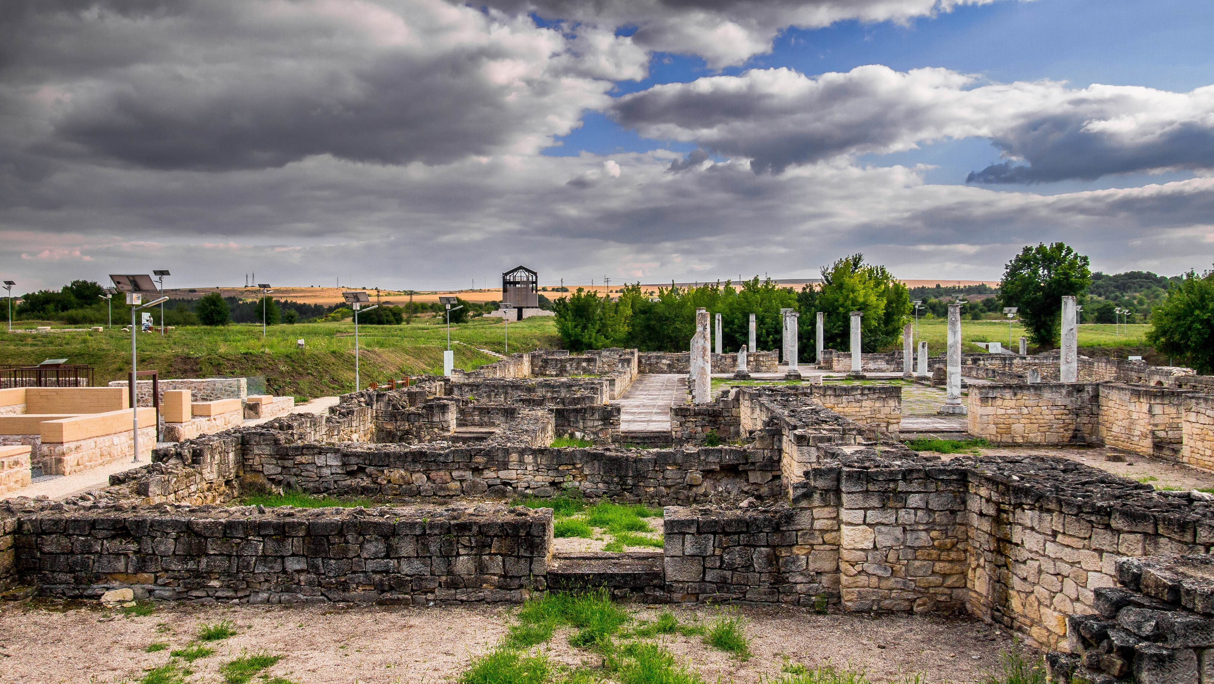 Античният комплекс "Абритус"